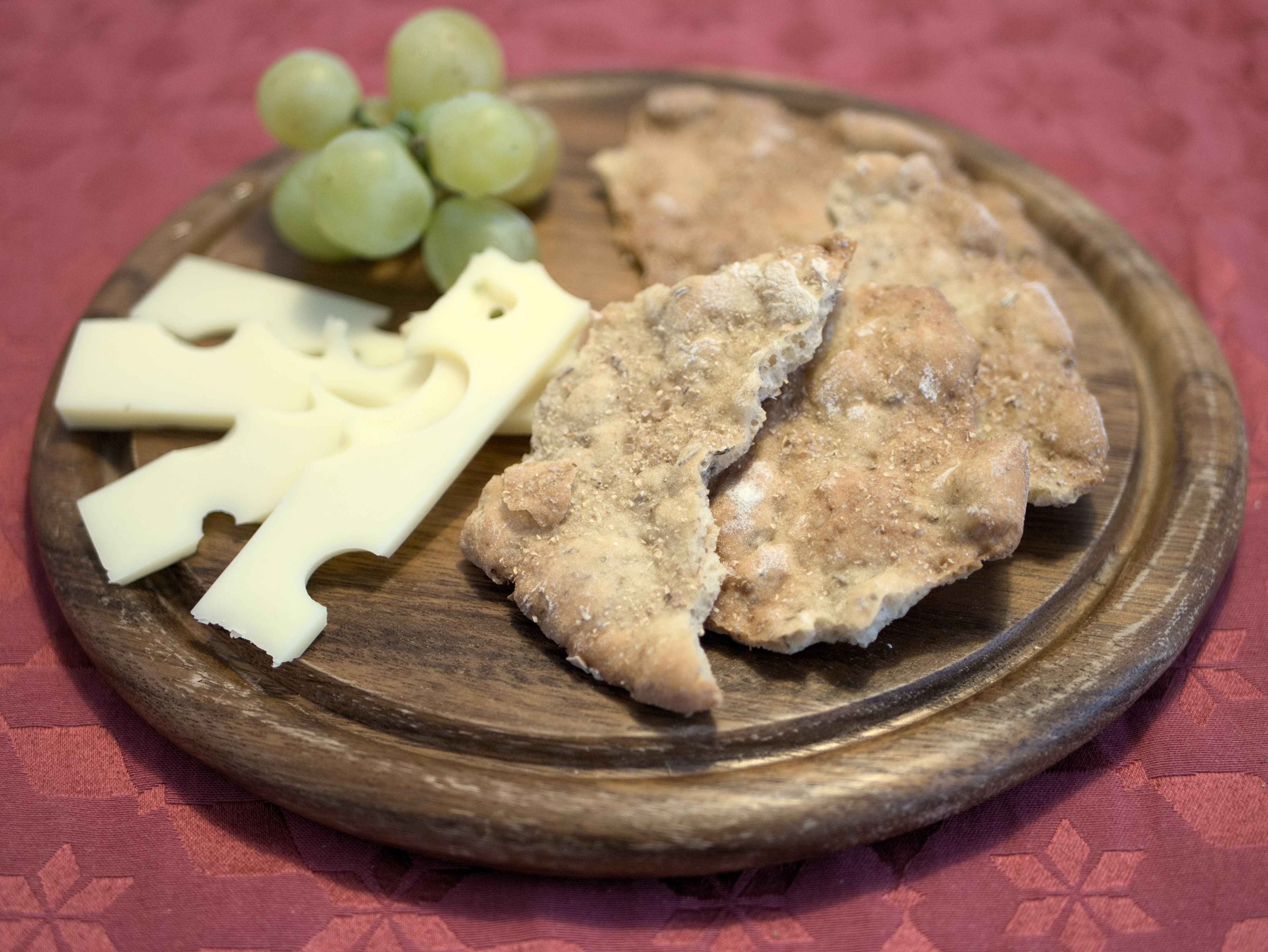 Südtiroler Schüttelbrot, angerichtet auf einem Holzbrett mit Käse und Weintrauben.